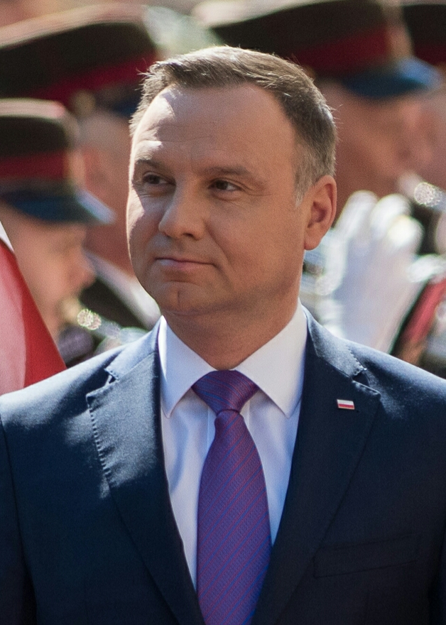 Prezydent RP Andrzej Duda podczas wizyty w Rumuni